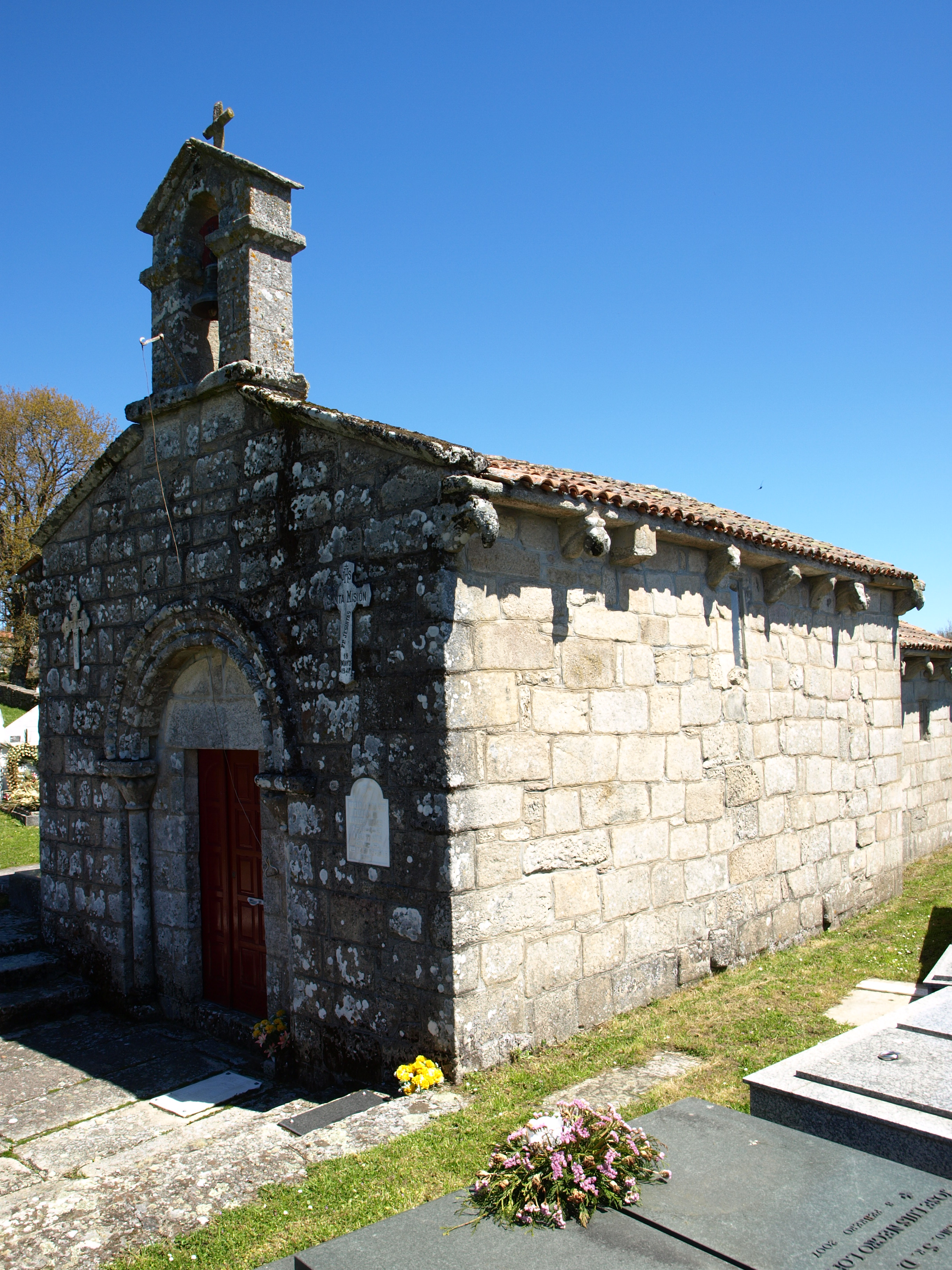 Igrexa parroquial de Cumbraos (Monterroso)